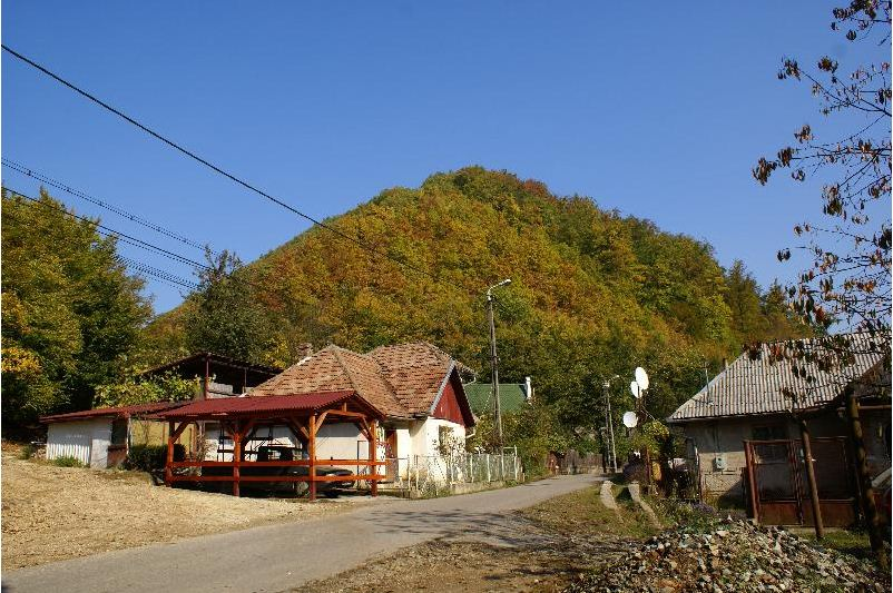 Cetatea din Baia Mare, punct "Valea Borcutului"